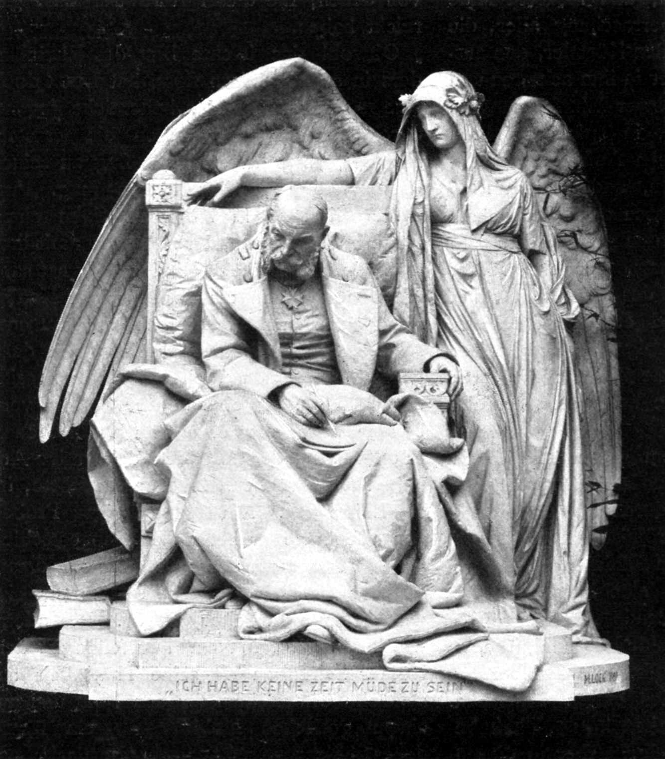 Skulptur "Ich habe keine Zeit müde zu sein" von Michel Lock.